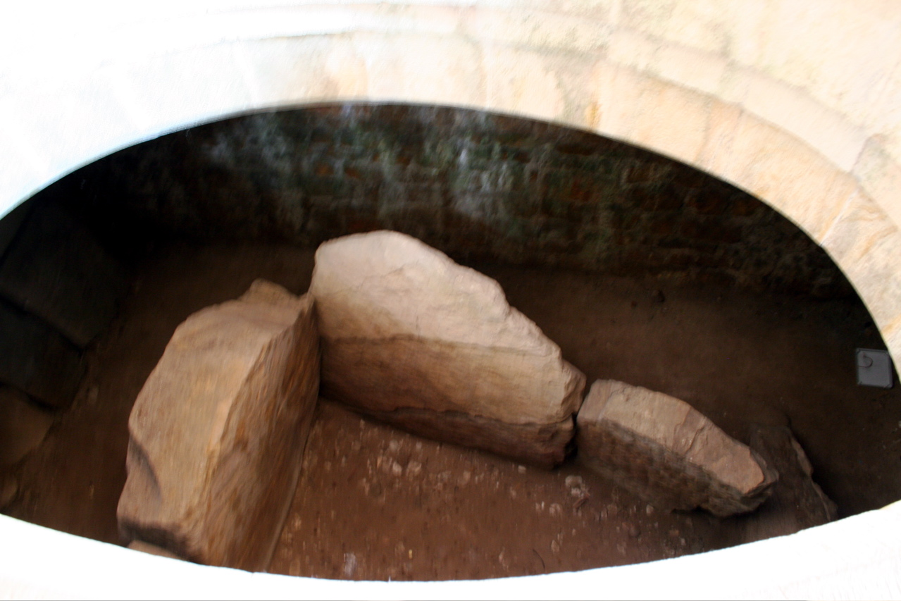 Dolmen de Santa Cruz, C. Onís Asturias